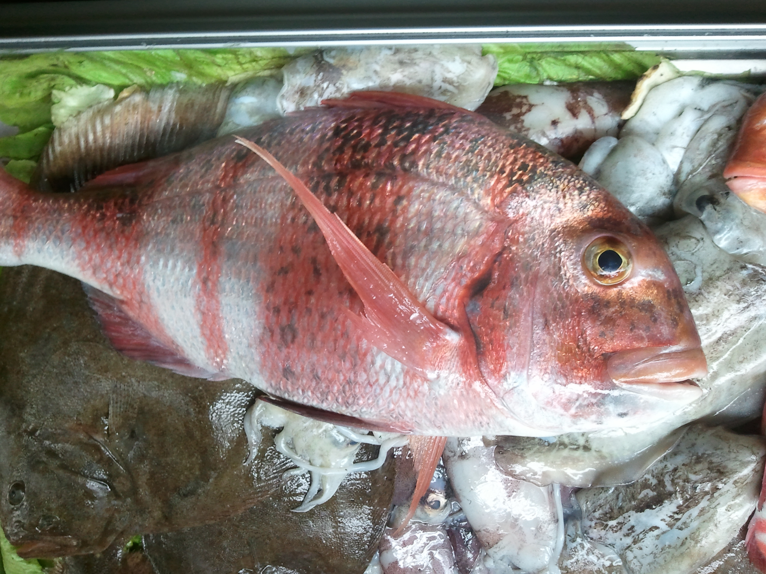 Urta (Pagrus auriga) Chiclana, Cádiz, España.